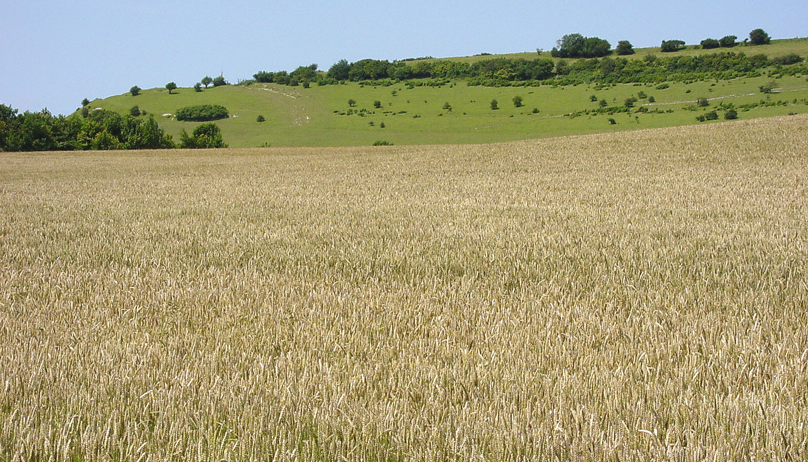 vue de profil d'une des cuestas du Boulonnais (Entre Saint-Omer et Boulogne-sur-mer, dans le Nord-Pas-de-Calais (France)